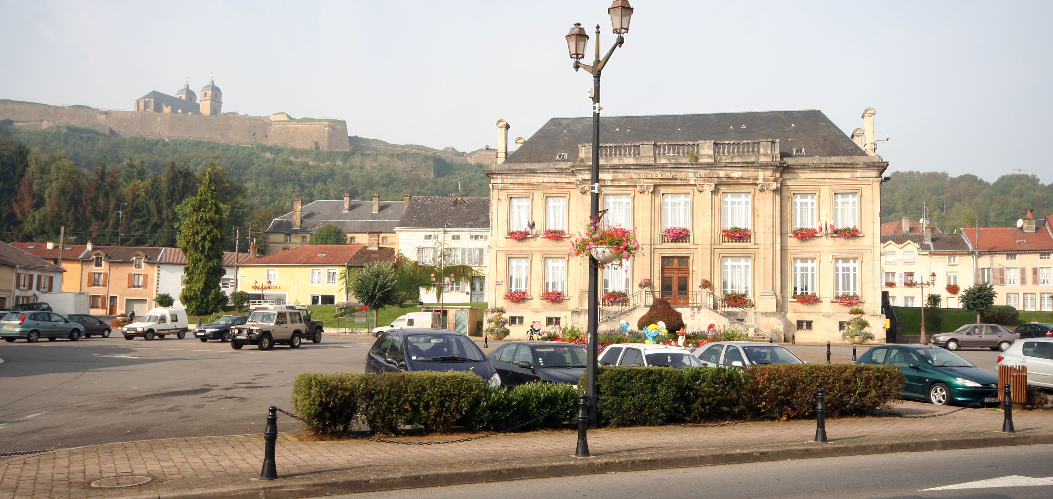 Montmédy, Frankreich: Rathaus mit der Zitadelle im Hintergrund